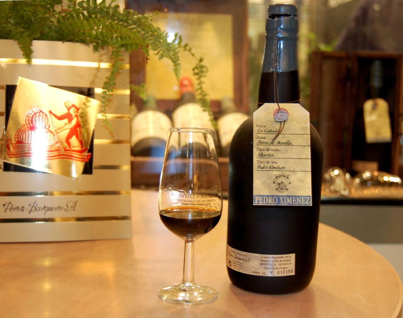 Vinos premiado con 100 puntos en el Concurso Internacional de Vinos Andalucía 2007 : La Cañada Pedro Ximénex de Bodegas Pérez Barquero de la DO Montilla-Moriles.